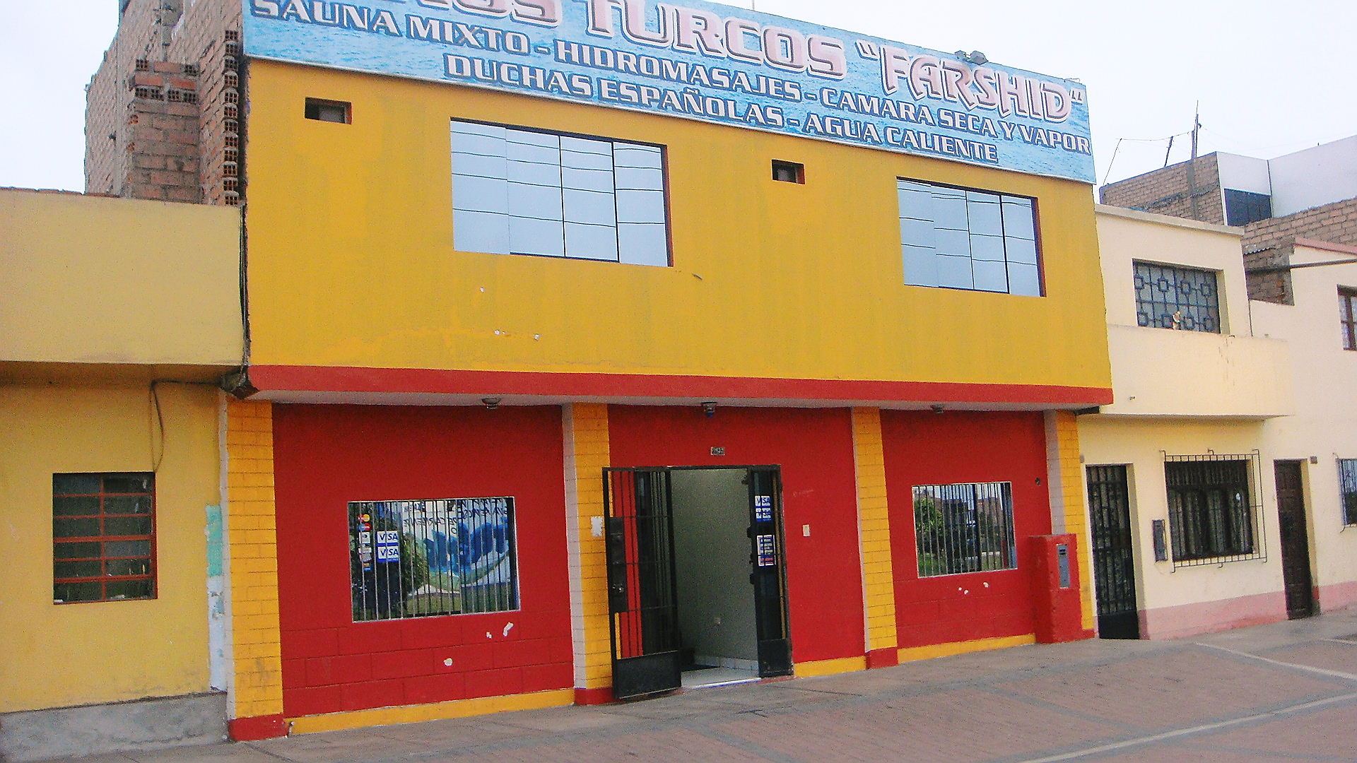 SAUNA FARSHID